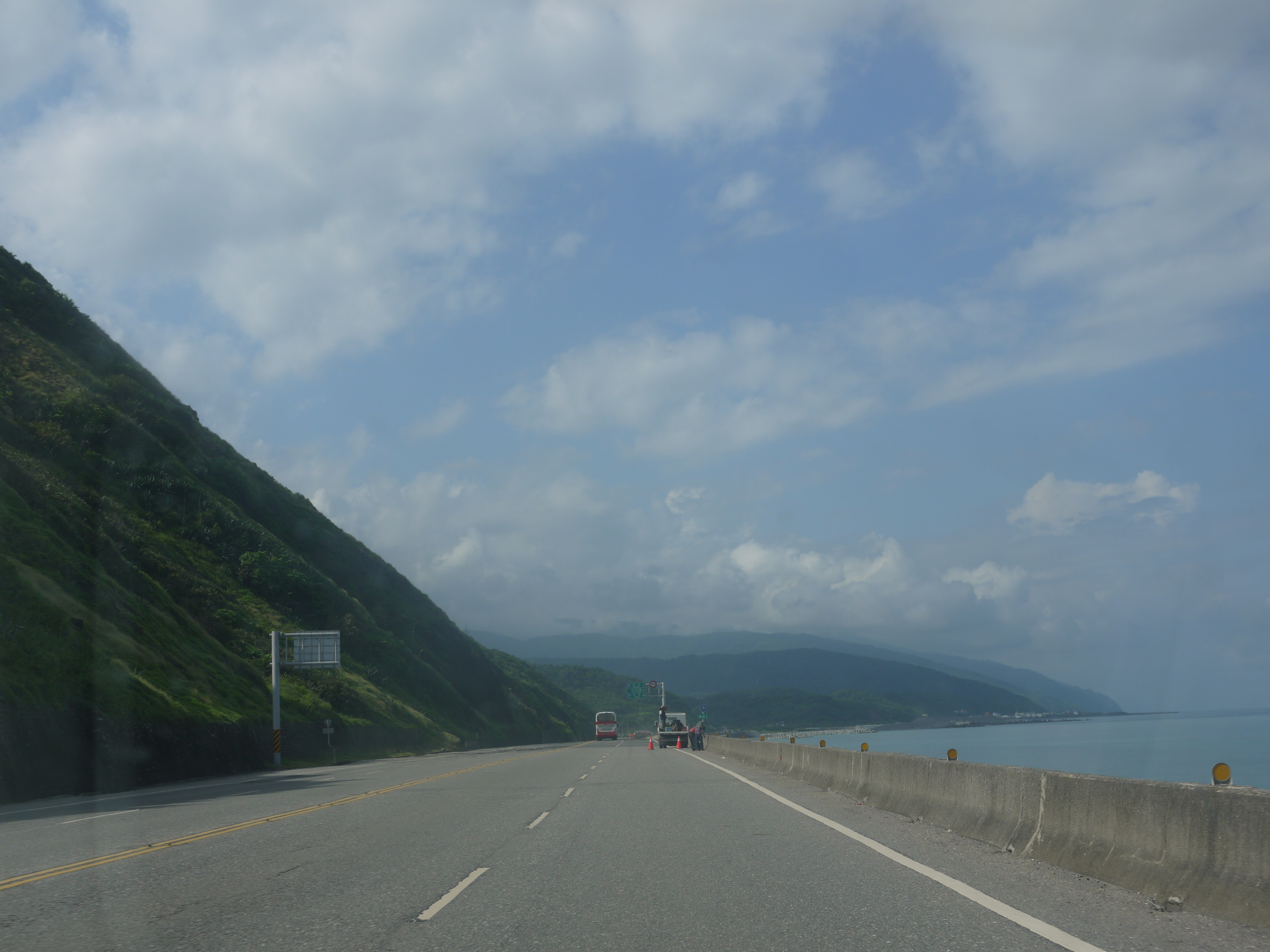 台東縣大武鄉 台9線 南迴公路